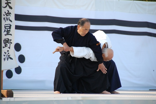 四天流組討形「風身」